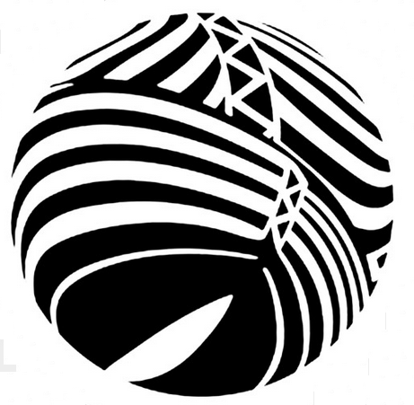 Riproduzione digitale del motivo geometrico di Leliel (Neon Genesis Evangelion